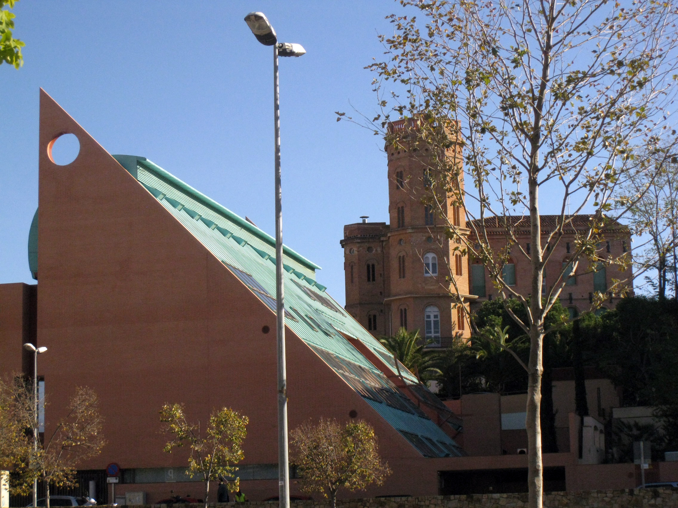 Nou edifici del Bisbat de Terrassa, al carrer de Vinyals, vora la Rambla d'Ègara, amb la torre dels Escolapis al fons. Inaugurat l'any 2010, és obra de l'arquitecte Jan Baca.